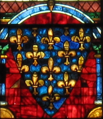 Vitráž ze Chartres - erb Kapetovců